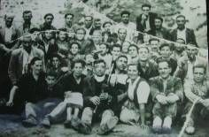 Fotografía antigua de mineros en las minas de talco